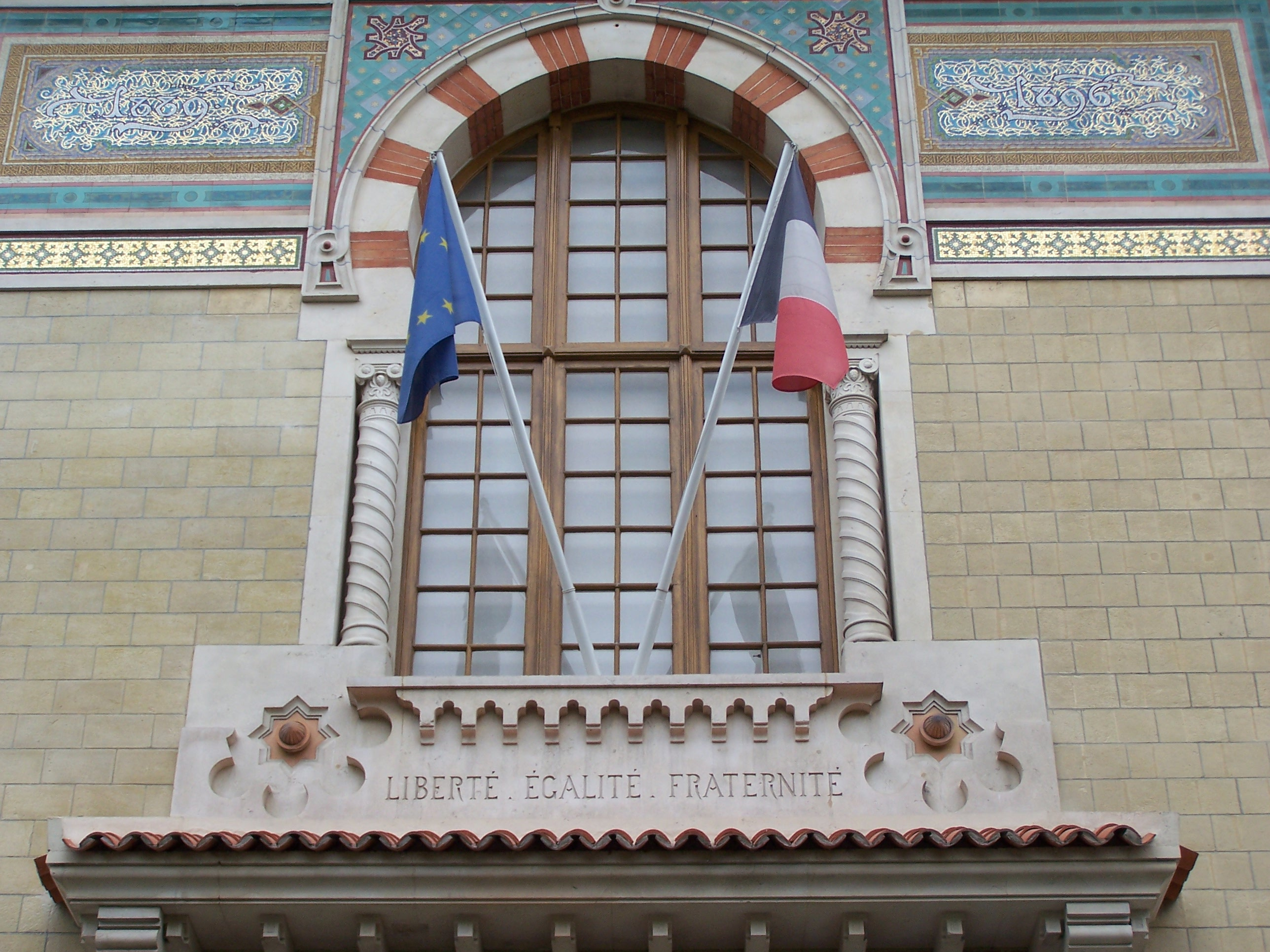 Détail du porche de l'ENA à Paris